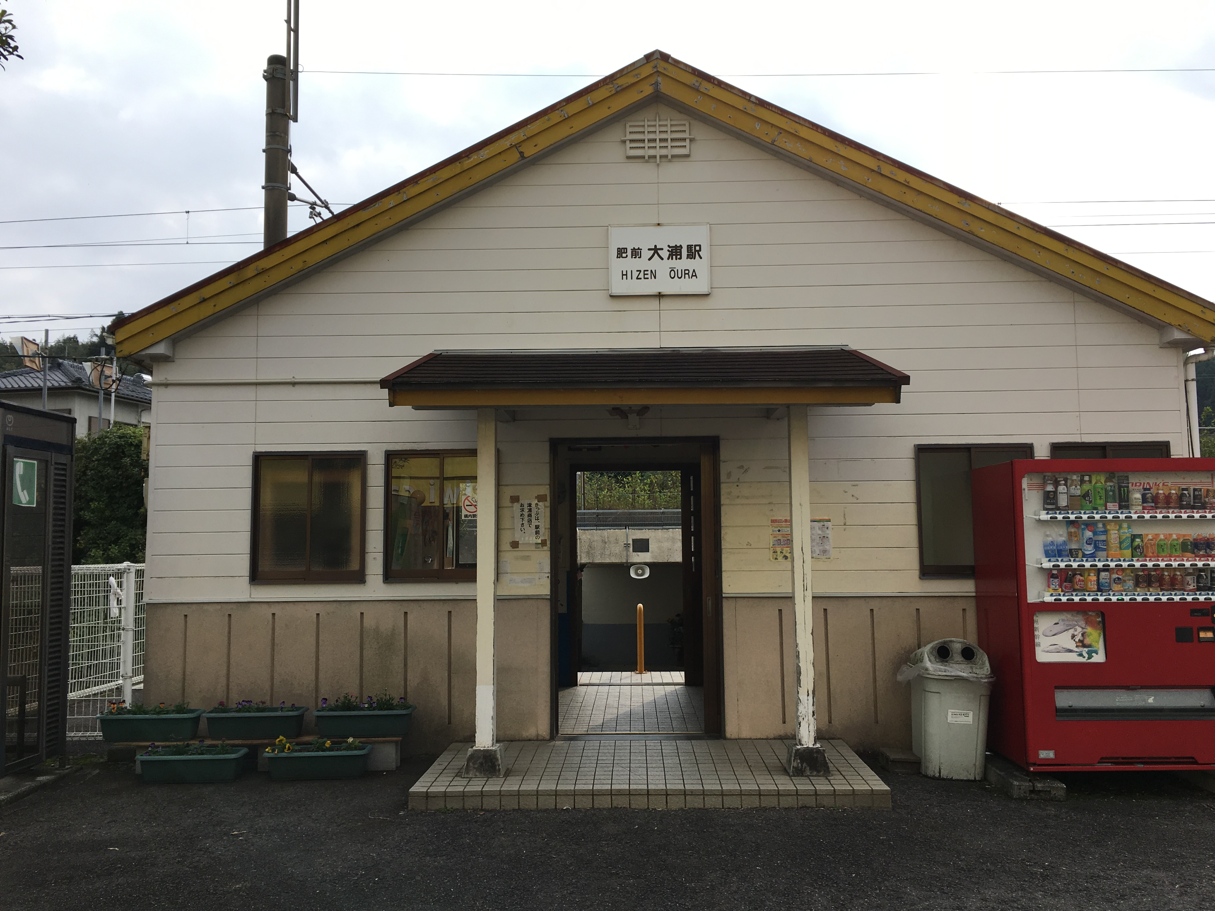 肥前大浦駅